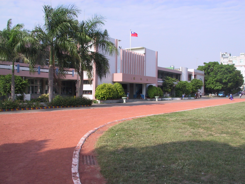 臺灣台南市志開國小操場。